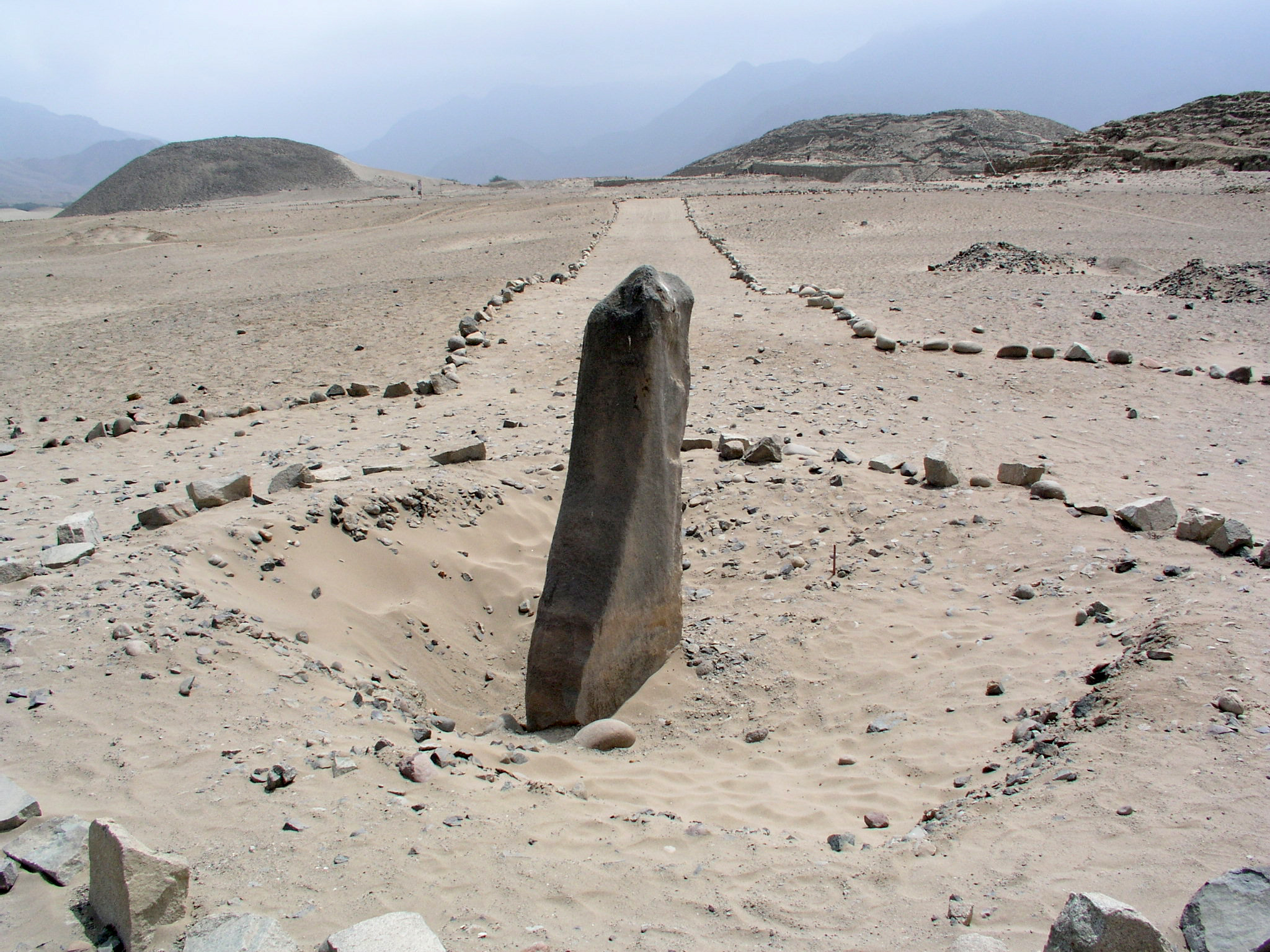 Pirámides en Caral, Valle de Supe, Region Lima, Peru. Piedra parada (Huanca).